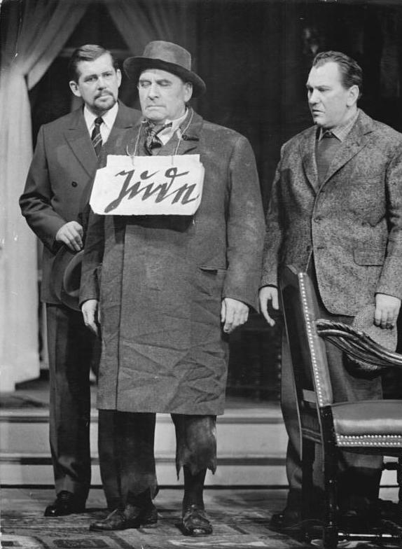 Zentralbild Hochneder Nl-Noa 19.12.1959 Premiere des Schauspiels "Professor Mamlock" im Deutschen Theater, Kammerspiele in Berlin. Am 21.12.1959 findet in den Kammerspielen des Deutschen Theaters in Berlin die Premiere des Schauspiels "Professor Mamlock" von Friedrich Wolf statt. UBz: eine Szene aus dem Schauspiel (Von links nach rechts): Oberarzt Dr. Carlsen (Waldemar Schütz), Professor Mamlock (Wolfgang Heinz) und Krankenpfleger Simon (Heinz Voss)."